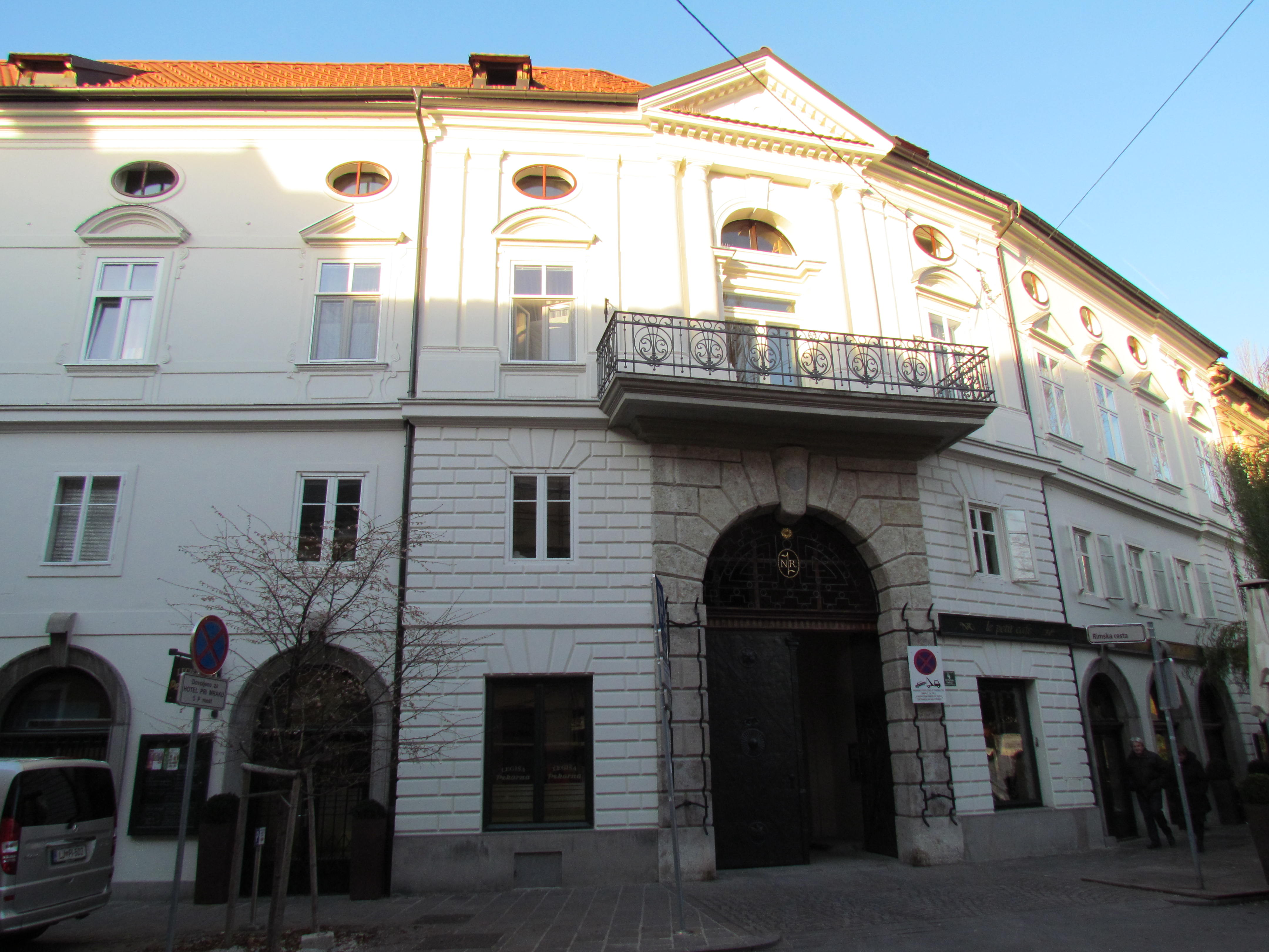 Hiša na Trgu francoske revolucije 4 v Ljubljani, ki morda stoji na temeljih rimskega amfiteatra.